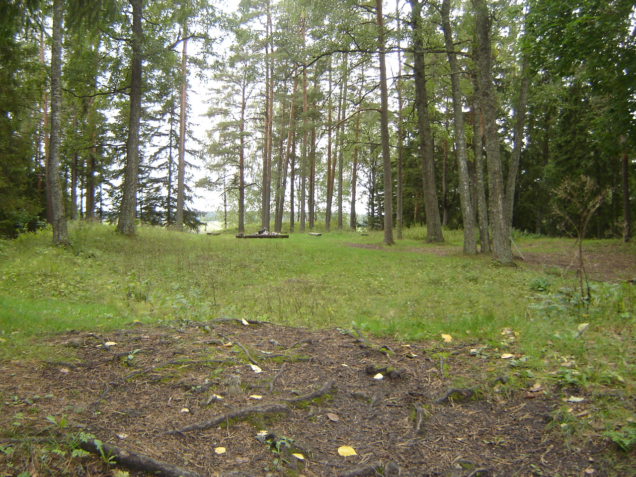 Keava linnuse õu